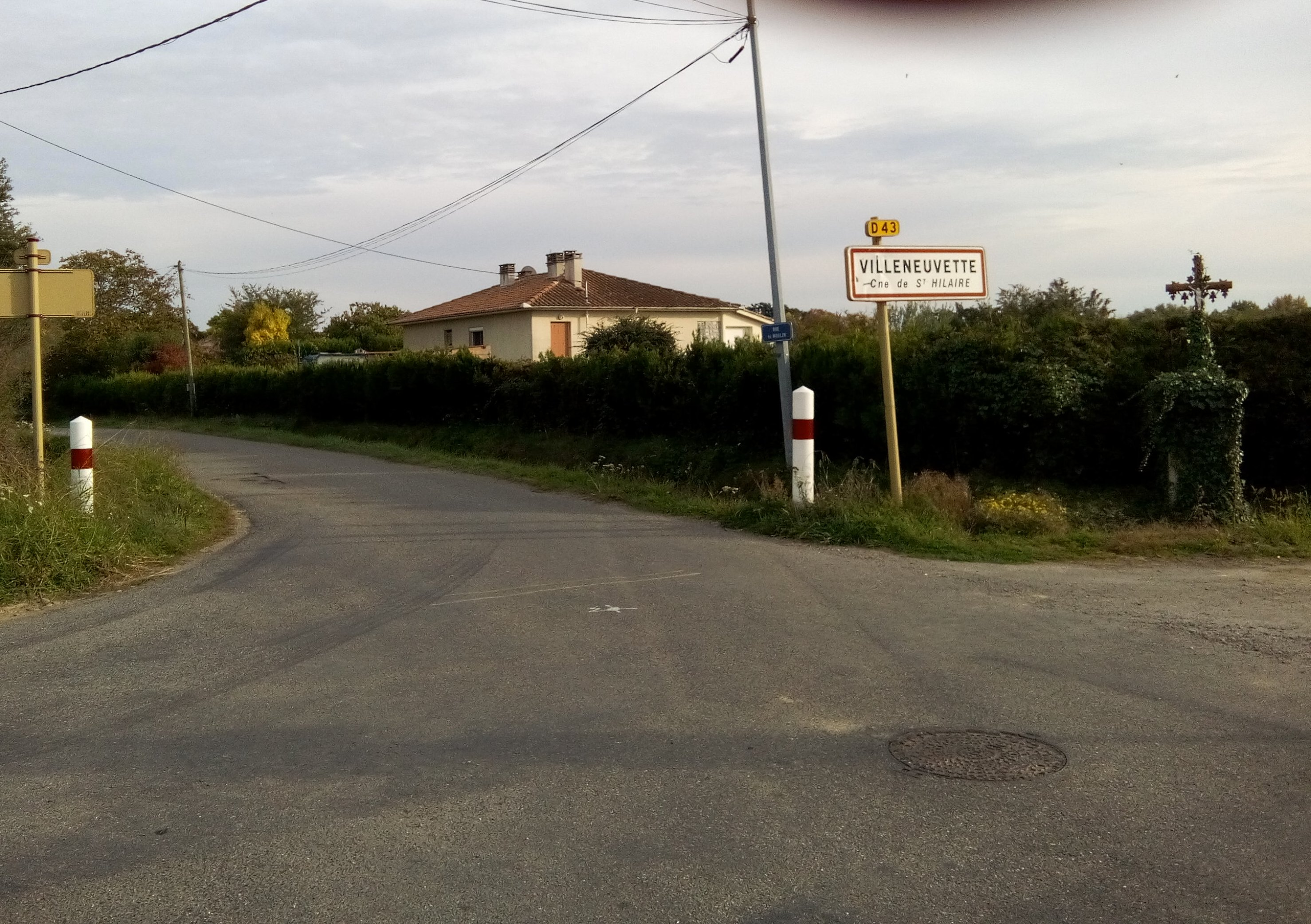 Villeneuvette commune de Saint-Hilaire en Haute-Garonne